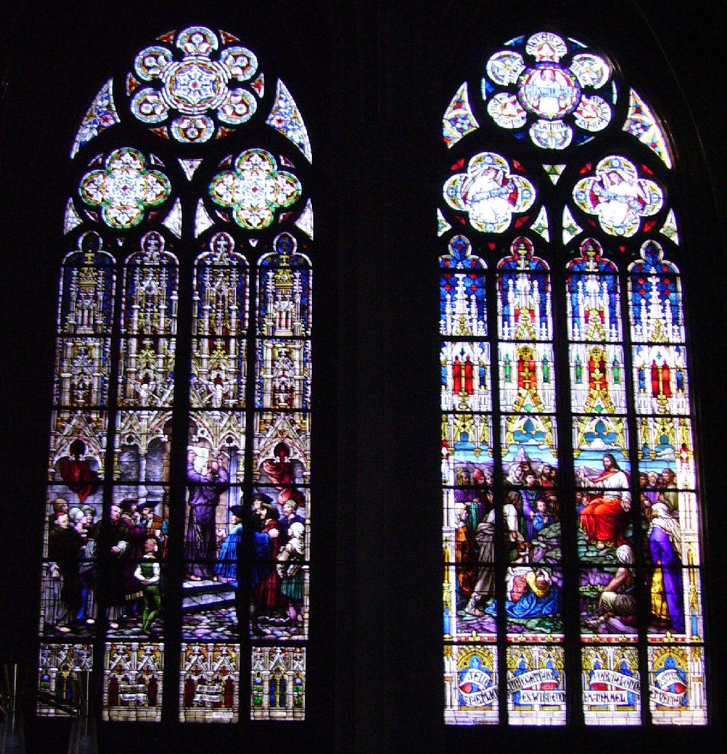 Gedächtniskirche (Memorial Church) in Speyer, Germany